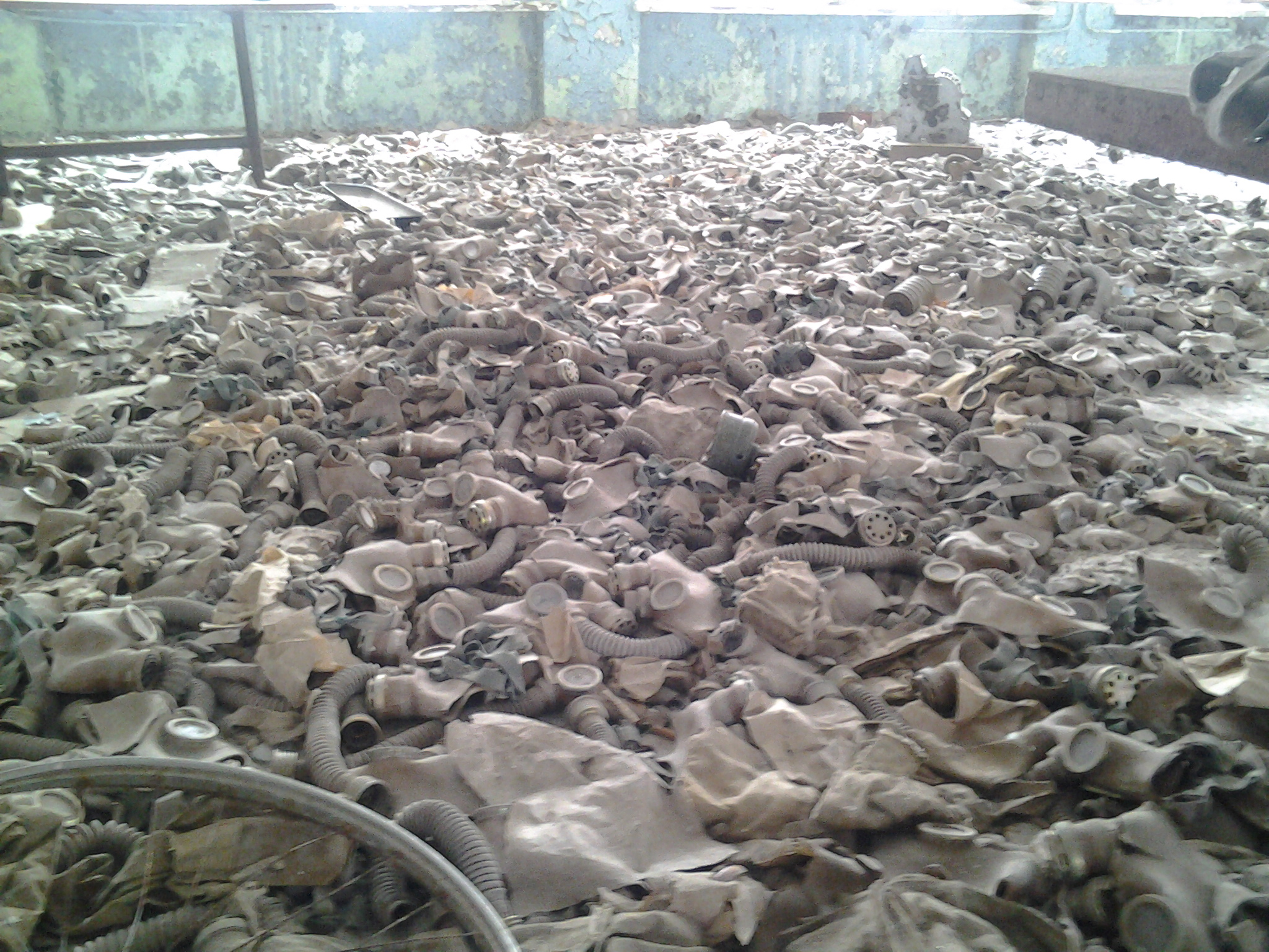 «Чорнобильський спеціальний», Іванківський район, Адміністрація зони відчуження та безумовного (обов'язкового) відселення